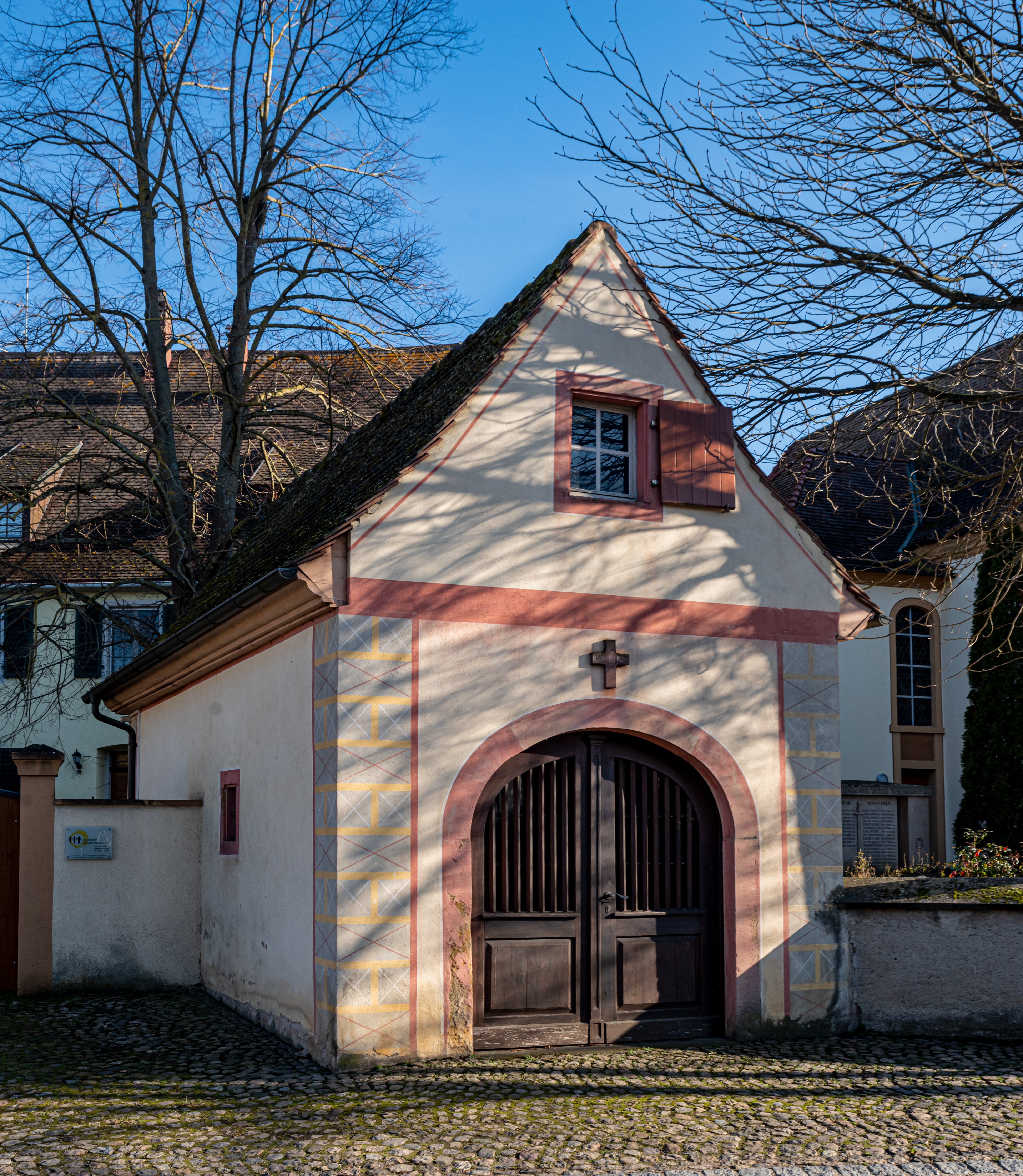 Bilder von St. Martin in Feldkirch